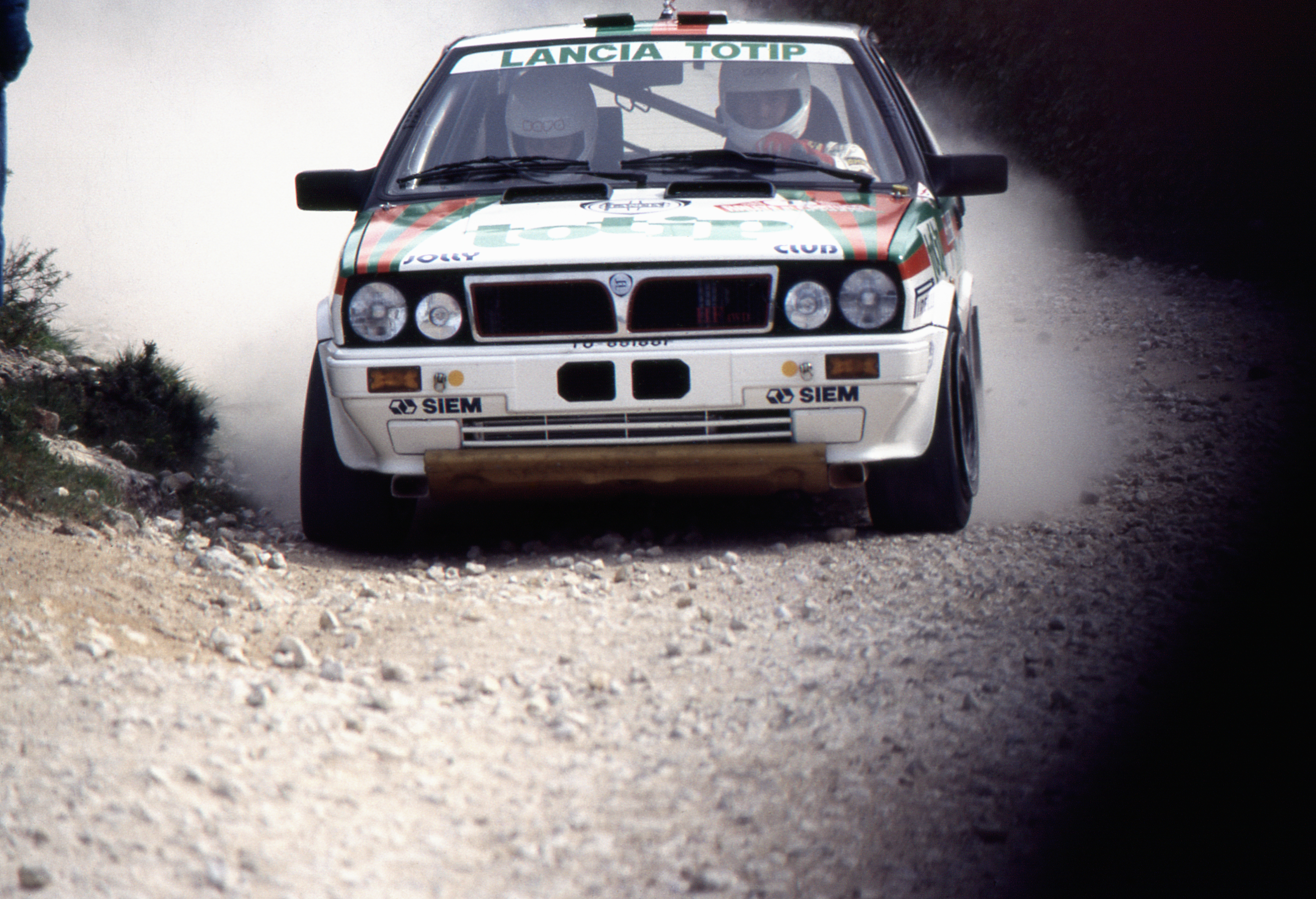 Slide_Agfachrome_Rallye de Portugal_1988_Montejunto_036